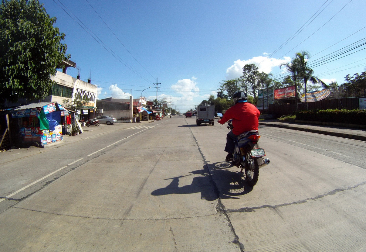 Ramon, Isabela, Philippines